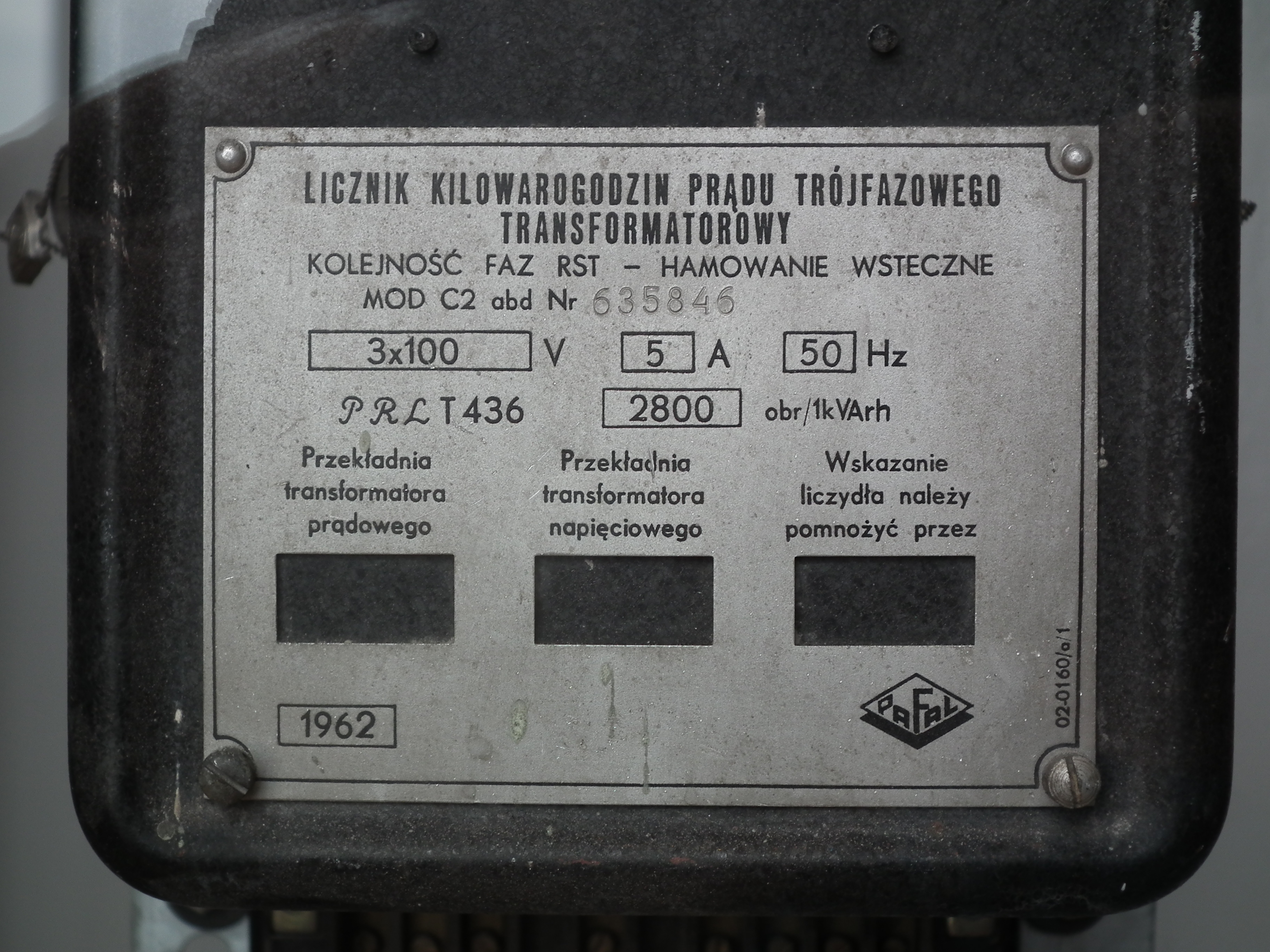 Licznik w łódzkiej EC1.